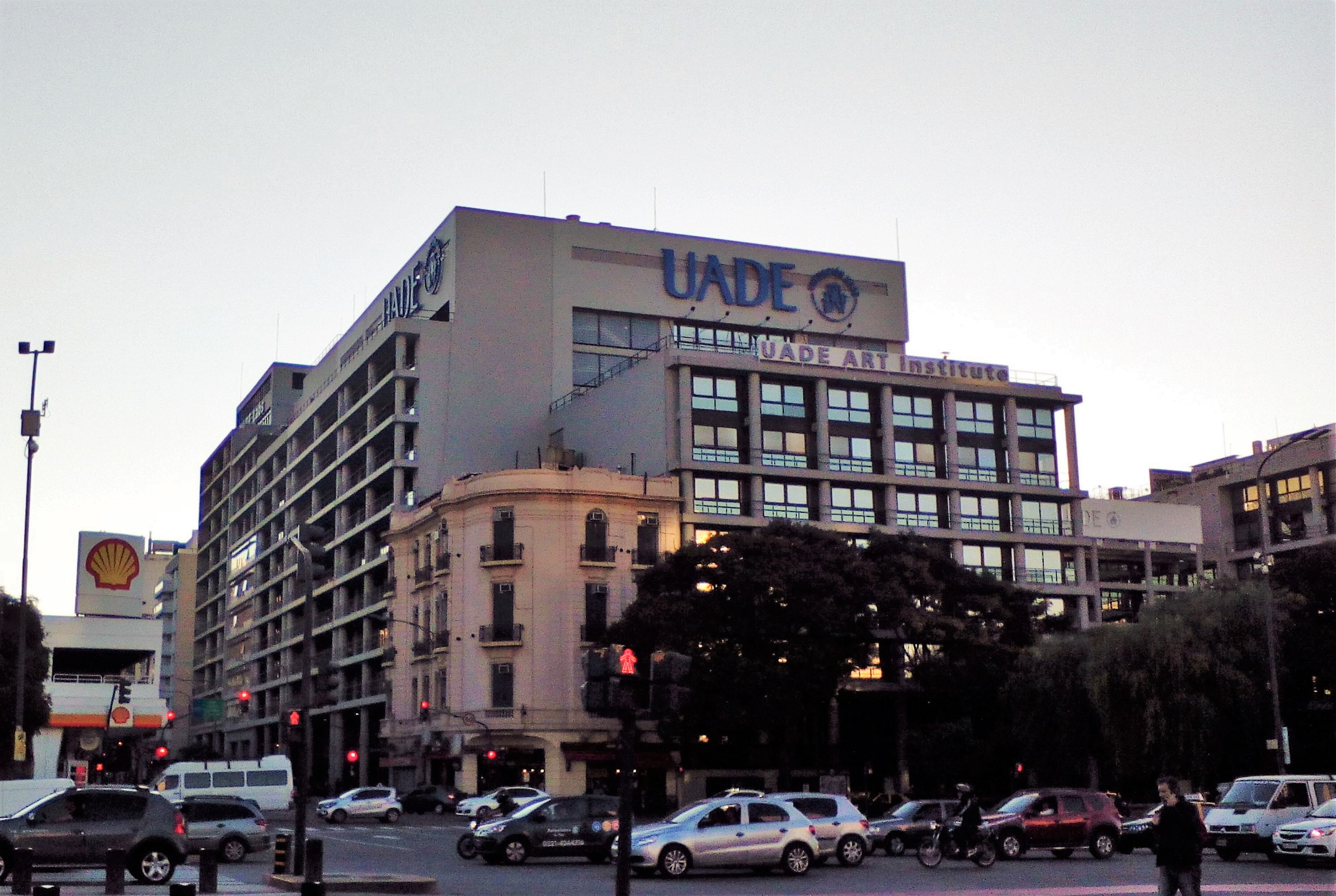 La Universidad argentina de la empresa (UADE) vista desde las calles 9 de julio e Independencia